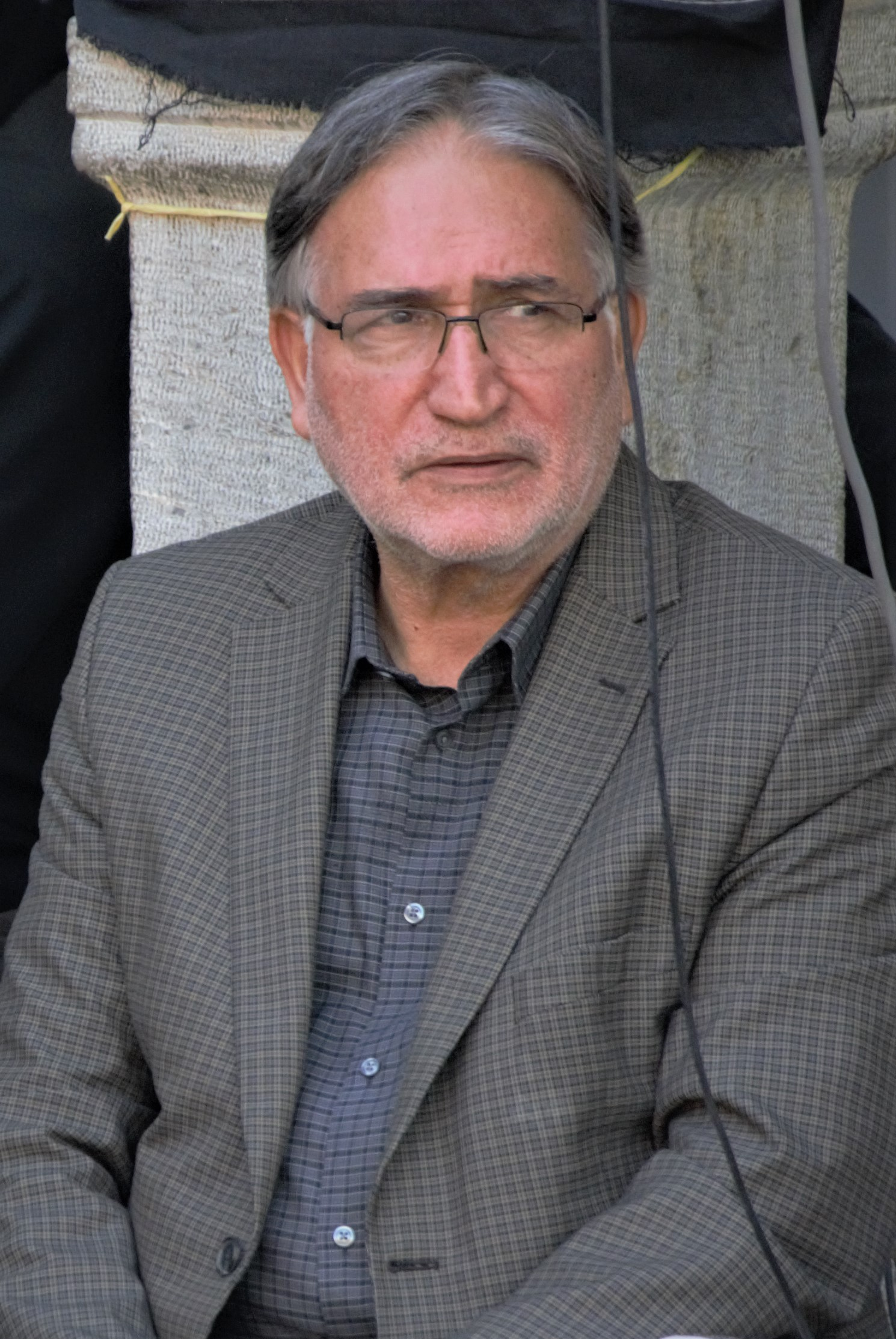 محمد نوری زاد در مراسم هفتمین سالگرد آیت الله منتظری - حسینیه اعظم نجف آباد